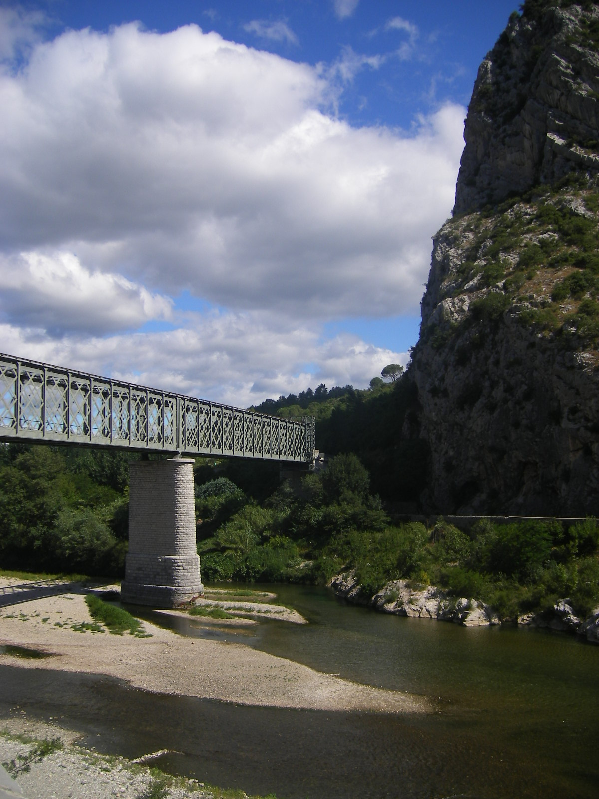 Anduze, département du Gard, France. Porte des Cévennes. Vue vers le nord du pont du train à vapeur des Cévennes, depuis la route dite "chemin de Nîmes à Saint-André-de-Valborgne" en rive droite du Gardon d'Anduze (côté sud). Le Gardon d'Anduze est le nom d'une section de la rivière le Gardon (et non un tributaire de ce dernier). L'amont du Gardon est à gauche. De l'autre côté de la rivière on aperçoit le parapet de la D129 ou route de Générargues.